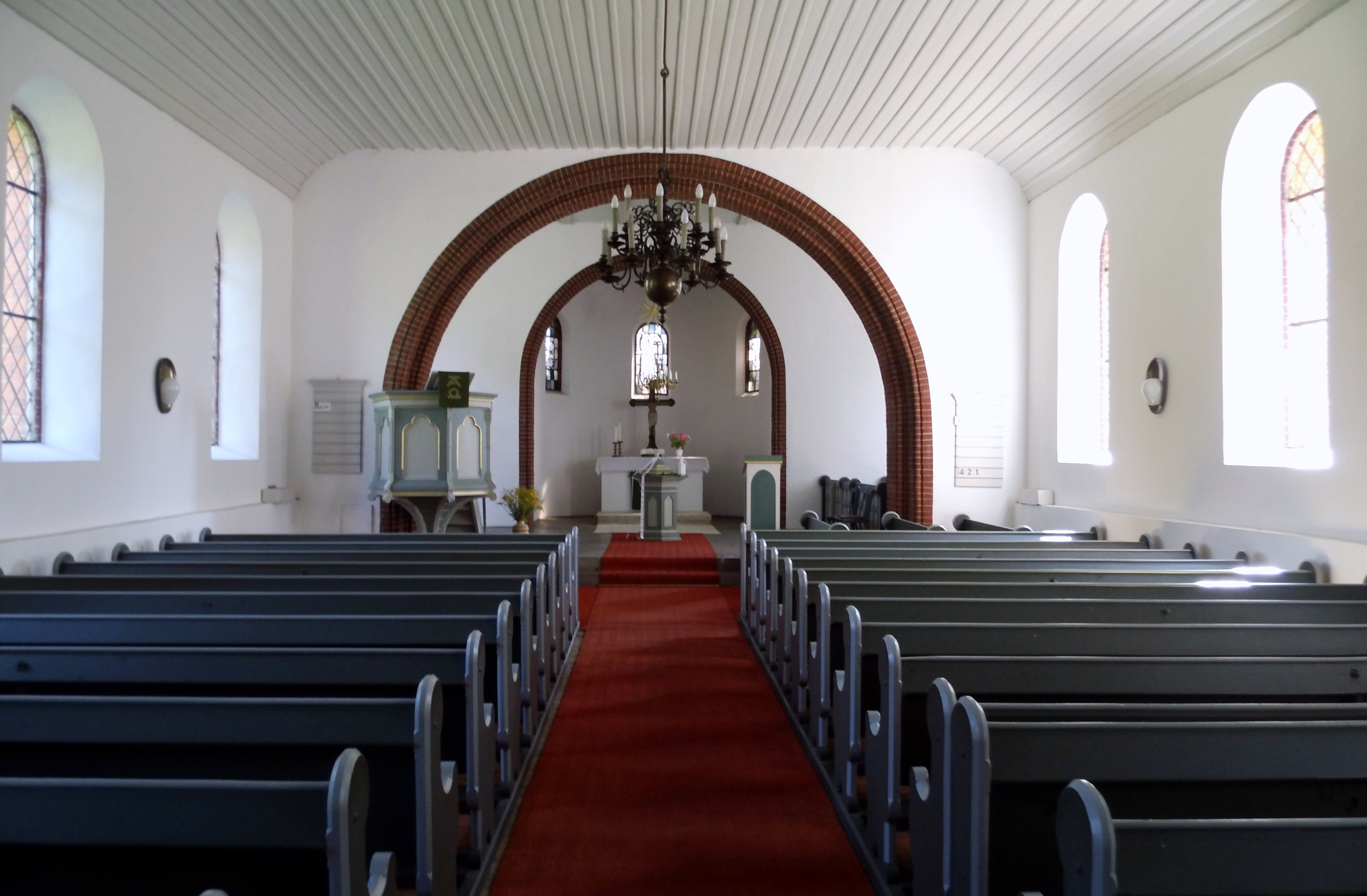 Inneres der evangelisch-lutherischen Kirche in Prezelle (Samtgemeinde Gatow), Landkreis Lüchow-Dannenberg, Niedersachsen, Deutschland